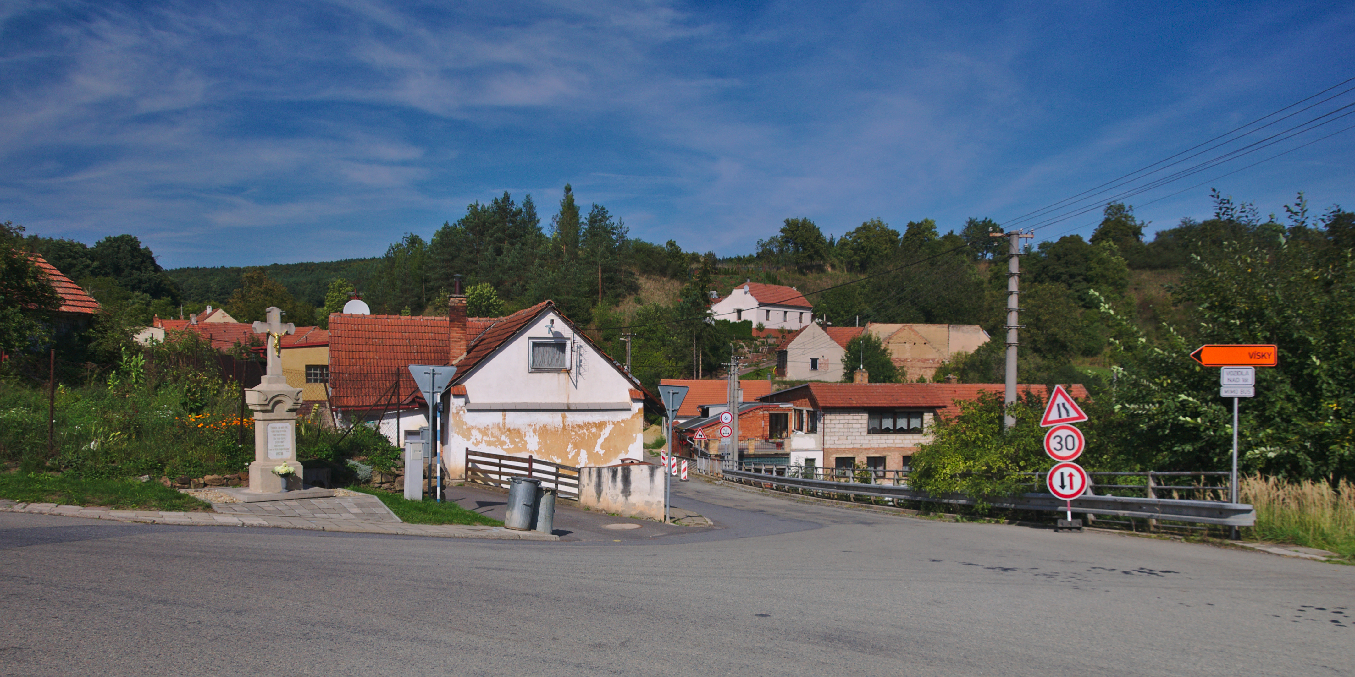 Pohled do vesnice, Podolí, Letovice, okres Blansko